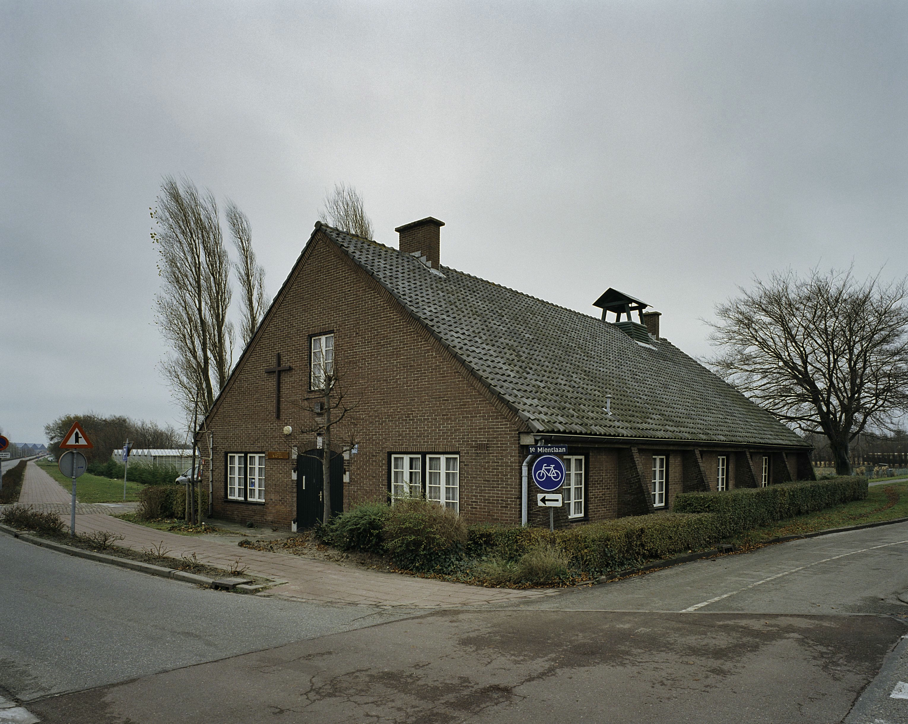 Kapel Marine Vliegkamp Valkenburg: Overzicht (opmerking: Gefotografeerd voor Monumenten In Nederland Zuid-Holland)